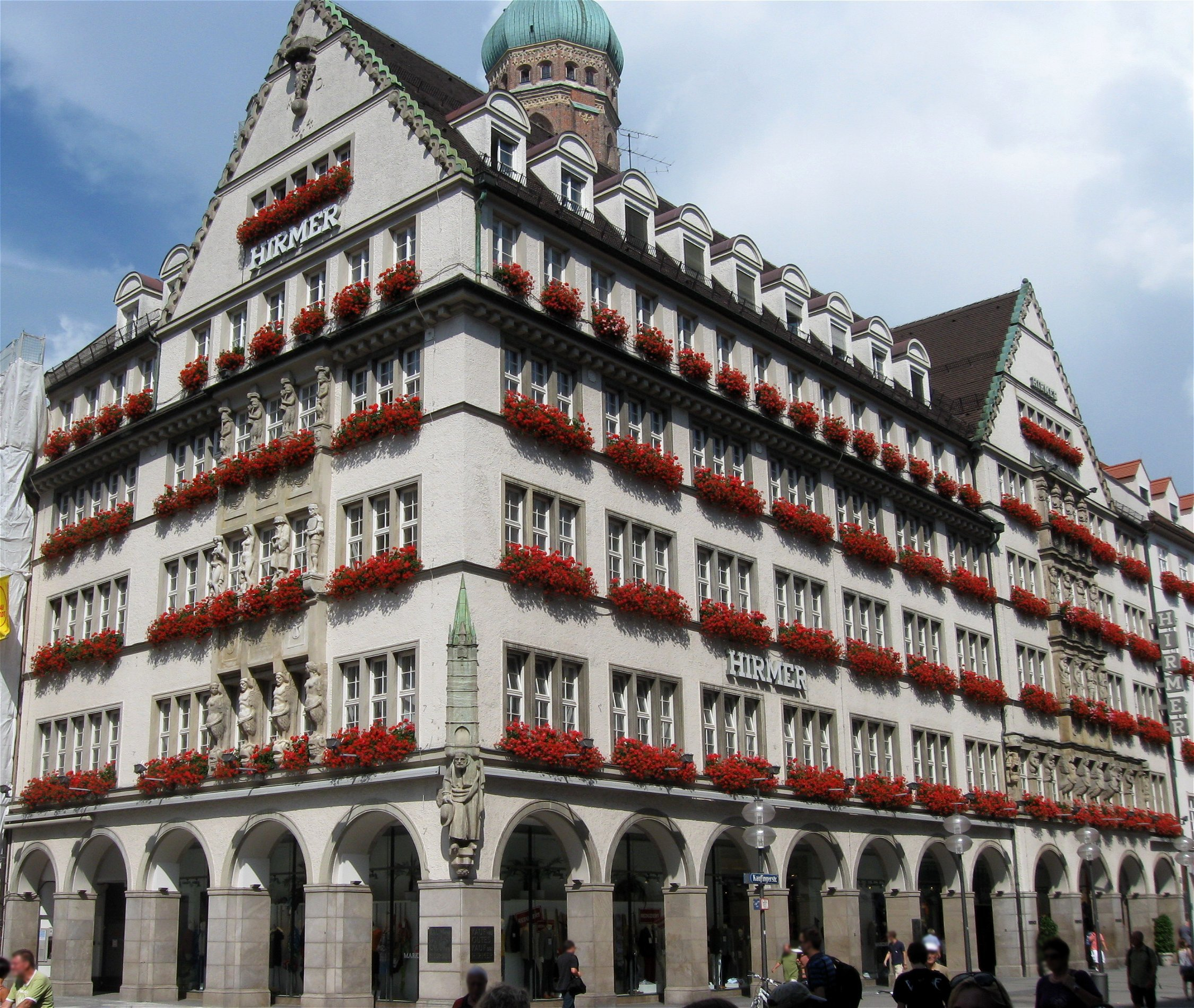 Kaufingerstraße 28; Geschäftshaus Zum Schönen Turm, jetzt Hirmer-Haus, stattlicher historisierender Eckbau, bez. 1914, von Eugen Hönig und Karl Söldner mit Bildhauerarbeiten von Julius Seidler; an der Ecke Modell des ehemals hier stehenden Schönen Turms.